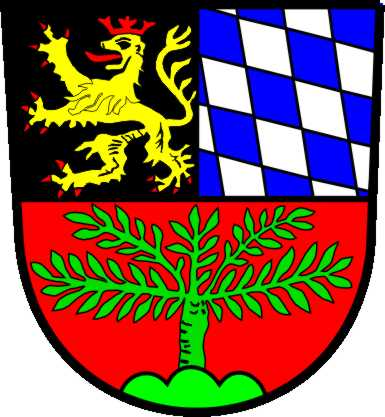 Wappen der Stadt Weiden in der Oberpfalz